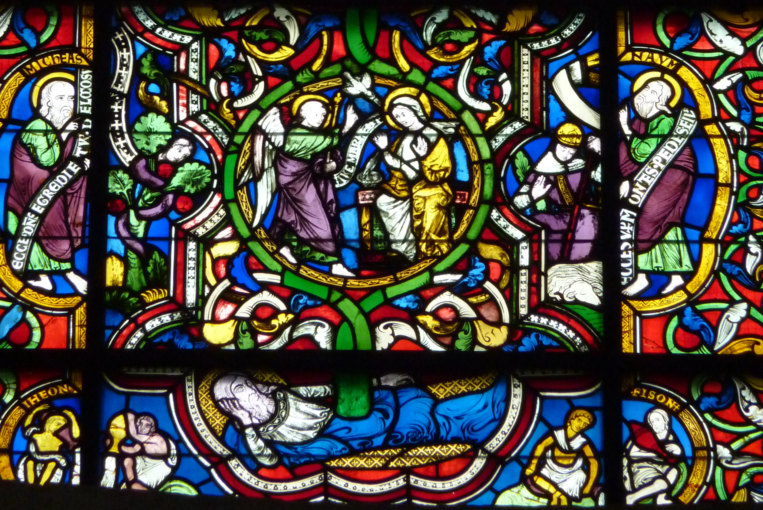 Bleiglasfenster (Jessefenster/Ausschnitt) in der Chorapsis der katholischen Pfarrkirche St. Kunibert in Köln, Darstellung: Jesse (liegend) und Verkündigung an Maria (neu von 1839 nach einem Karton von Joseph Fay, Ausführung von Peter Grass); die vier Figuren ganz unten verkörpern die vier Paradiesflüsse: Iheon, Nigris, Tigris und Fison (siehe Werner Schäfke: Kölns romanische Kirchen: Architektur, Kunst, Geschichte, Emons, Köln 2004, S. 115ff., ISBN 3897053217